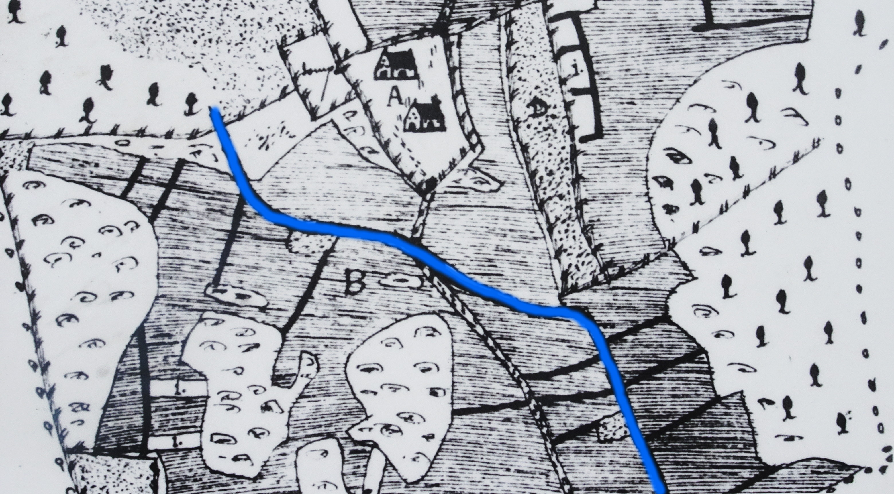 Stens gård, Järfälla kommun, Stockholms län. Del av karta över Sten och Yttersten av Thomas Christiernsson från år 1636. Kartan orienterad norr-söder. Original i Lantmäteristyrelsens arkiv. De två stugorna vid A betecknar de båda gårdsplatserna. De tätt streckade områdena är åker och de prickade är ängsmark. B anger platsen för vattenkvarnen. Den blåa linjen är Igelbäcken. I kartans nedre och högra kant går Stens och Ytterstens gräns mot Håga by. I vänstra kanten går gränsen mot Ålsta by. Källa: Järfällaboken 1957.